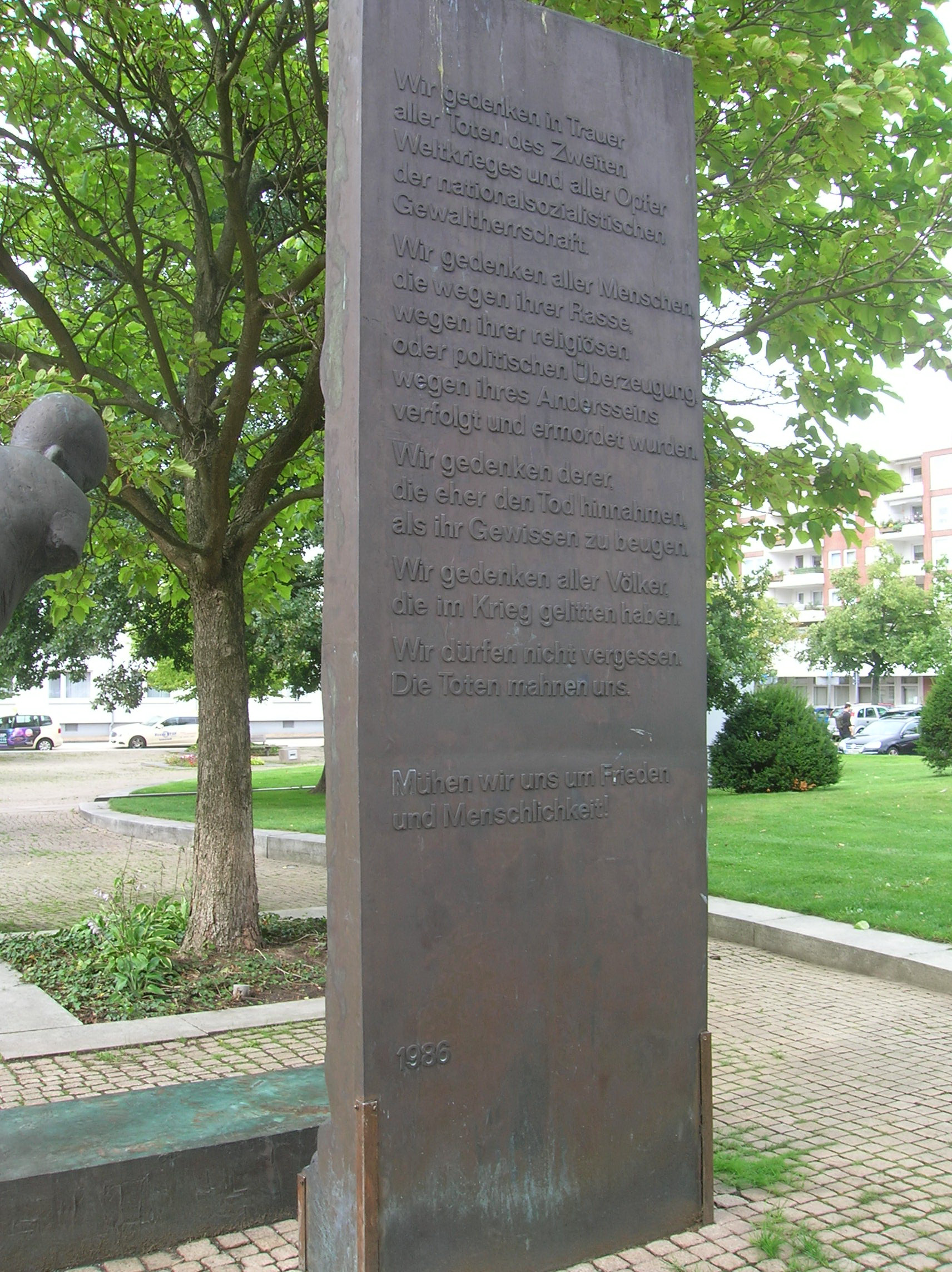 Textseite des Antikriegsdenkmals bei der Großen Kirche in Bremerhaven